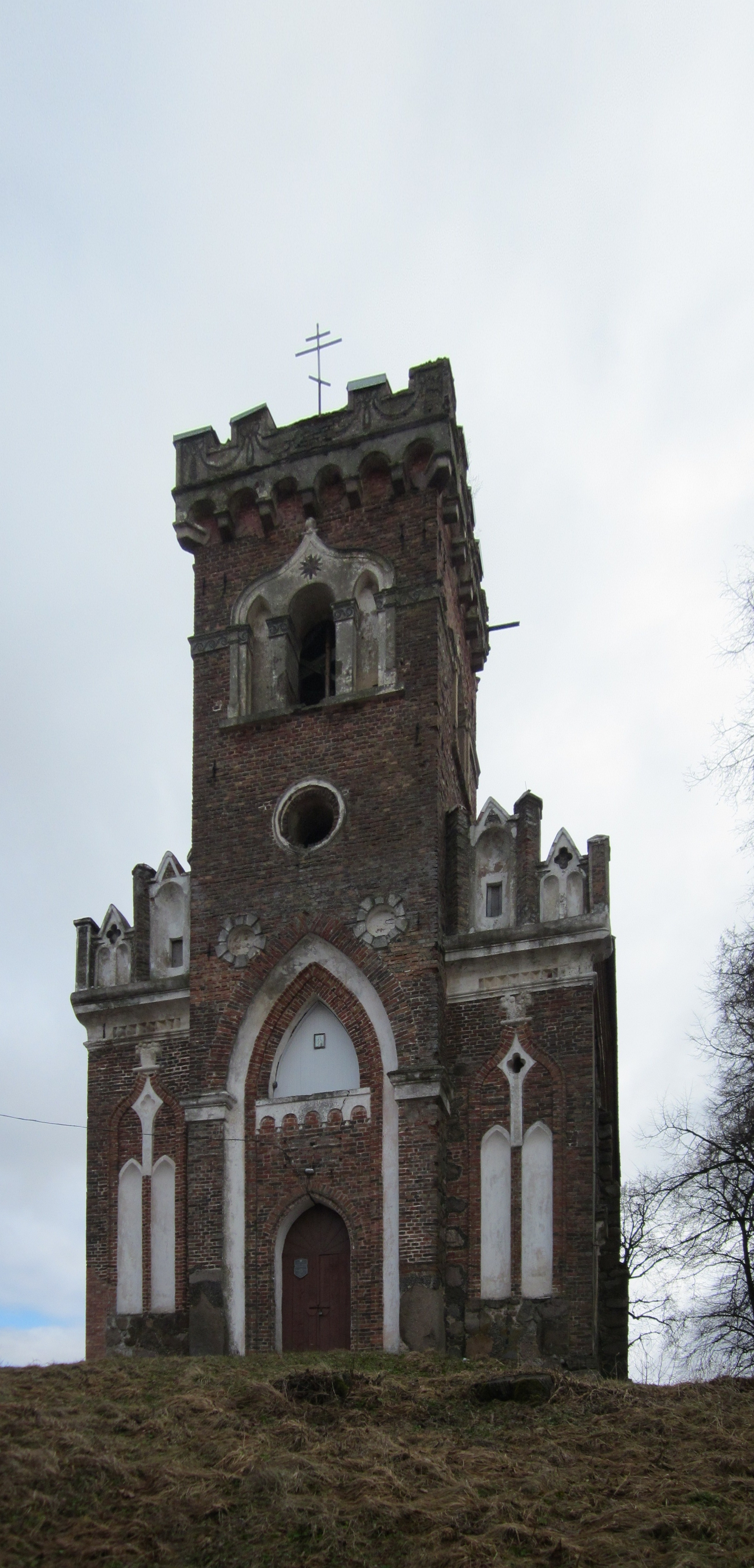 Беларуская (тарашкевіца): Царква Сьв. Барбары. в. Райца This is a photo of Belarusian heritage monument. Reference number: 413Г000323 ( WLM)